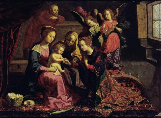 Casamento místico de S.ta Catarina (1640-60) no Museu Nacional de Arte Antiga, Lisboa, Portugal.